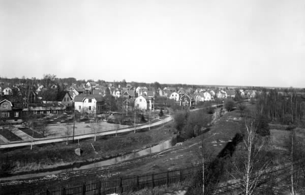 Rynninge egna hem a 1930